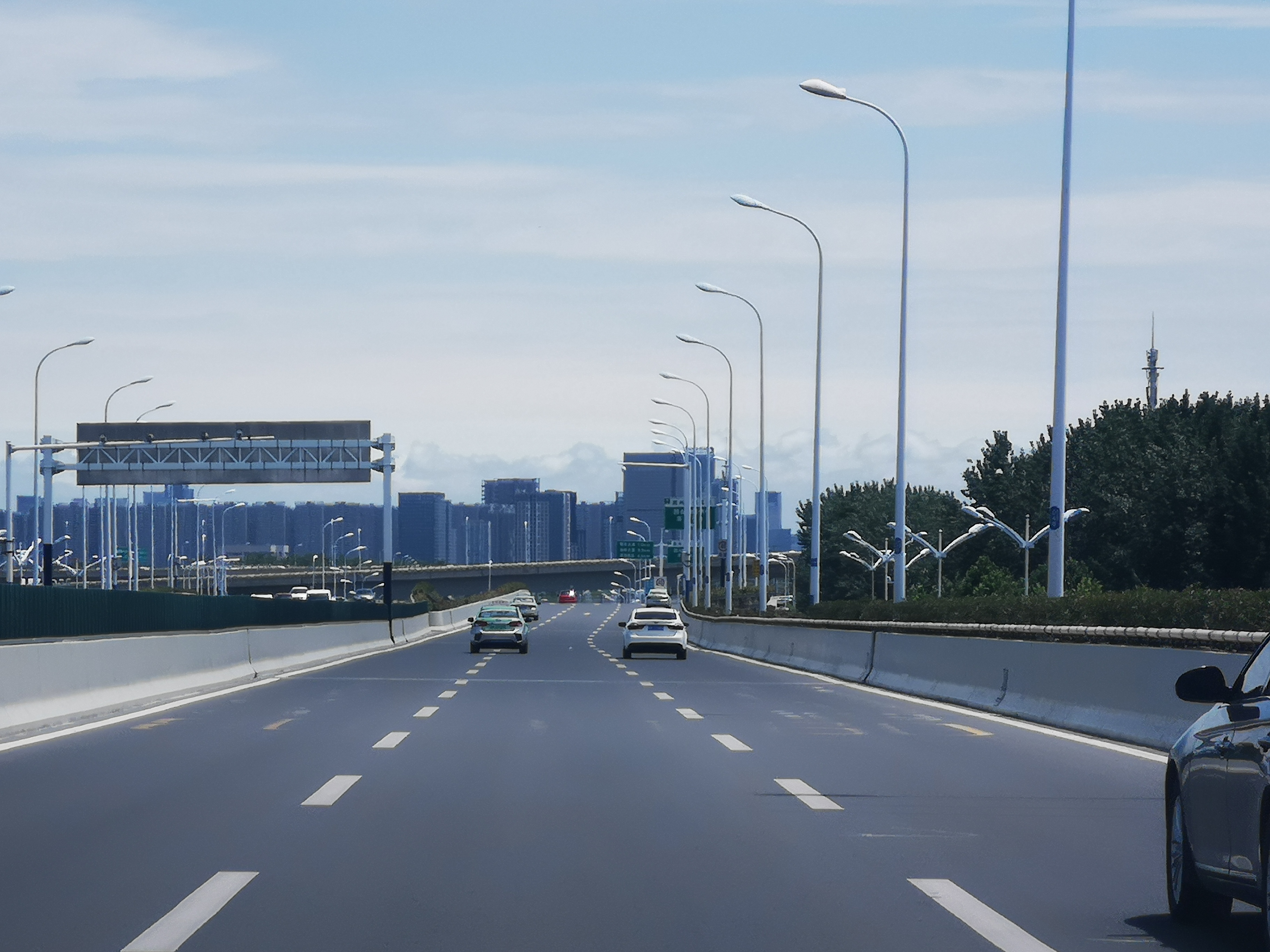 中文（中国大陆）: 合肥市徽州大道高架